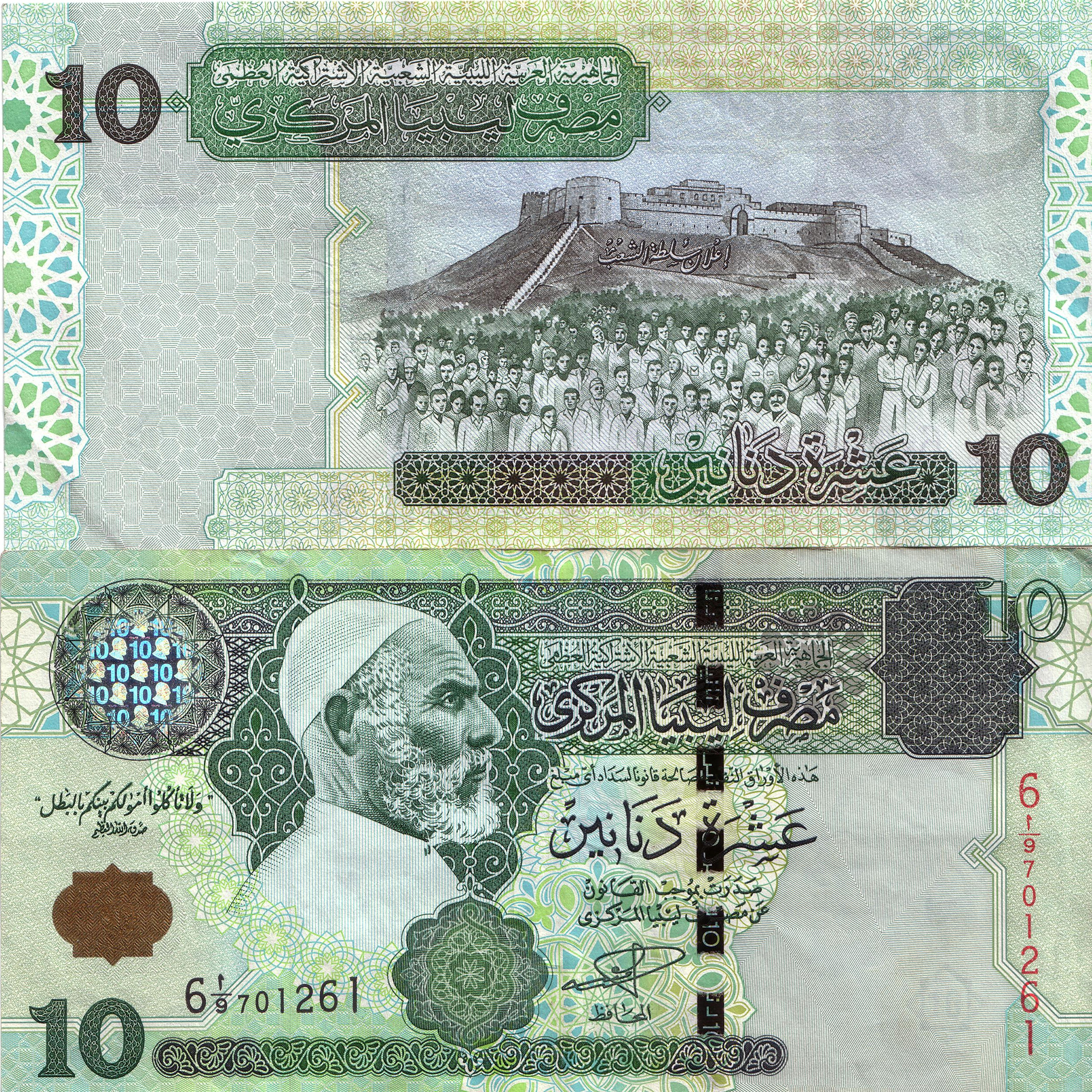 Банкнота номиналом 10 динар с портретом Омара Мухтара и изображением крепости в Себхе.